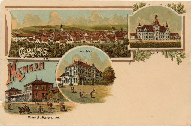 Ansichtskarte „Gruß aus Mengen“ mit Gesamtansicht von Mengen und drei Einzelansichten: „Bahnhof und Restauration“, „Hotel Baier“ und „Spital“.